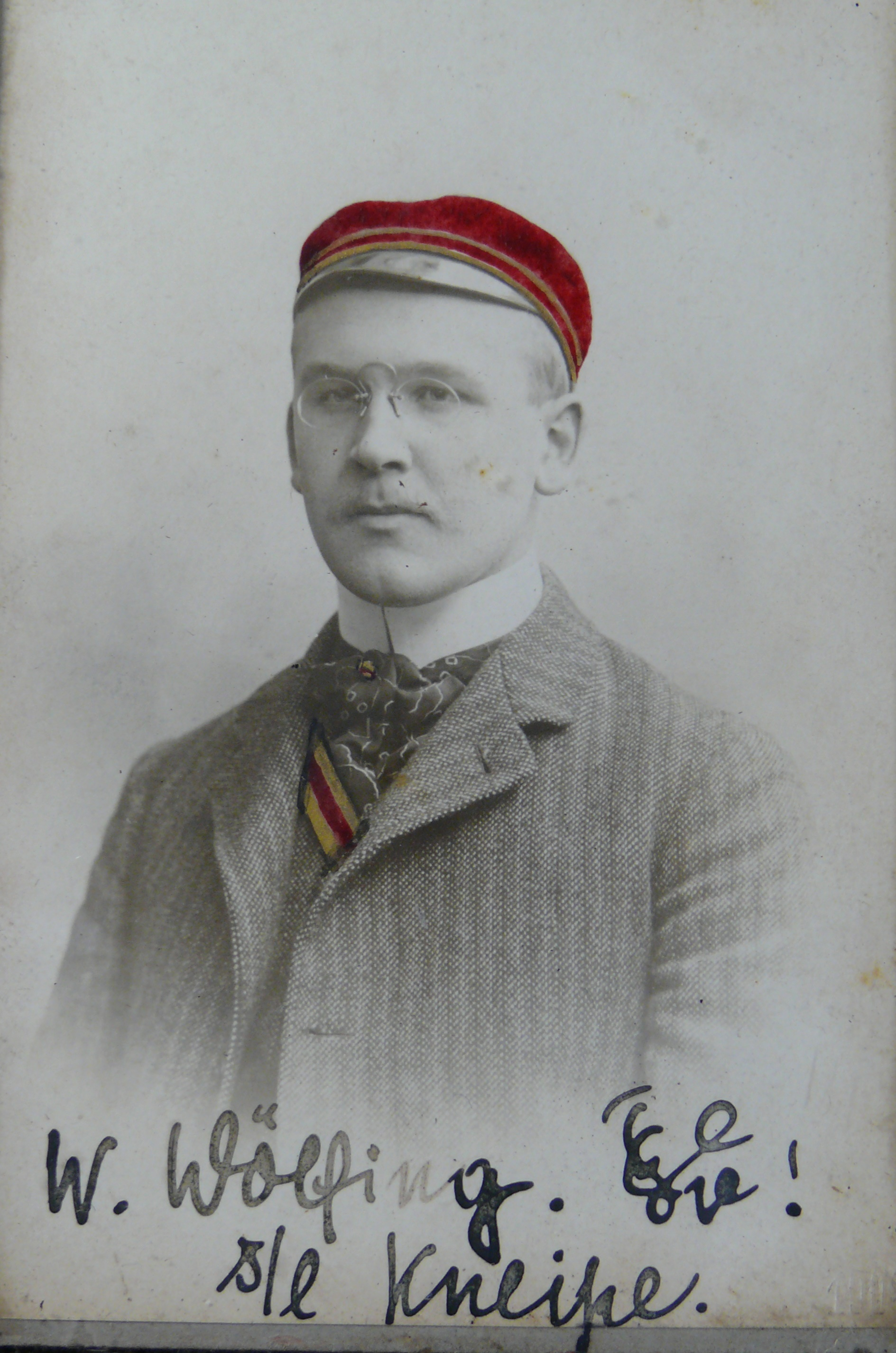 Porträtfotographie von Wilhelm Wölfing (1883-1972) als Aktiver des Corps Vandalia Heidelberg